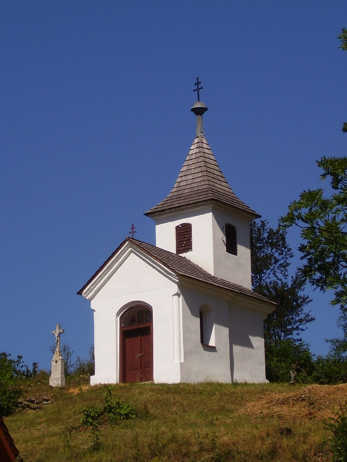 Kaple (Lubné), S od obce na návrší, Lubné